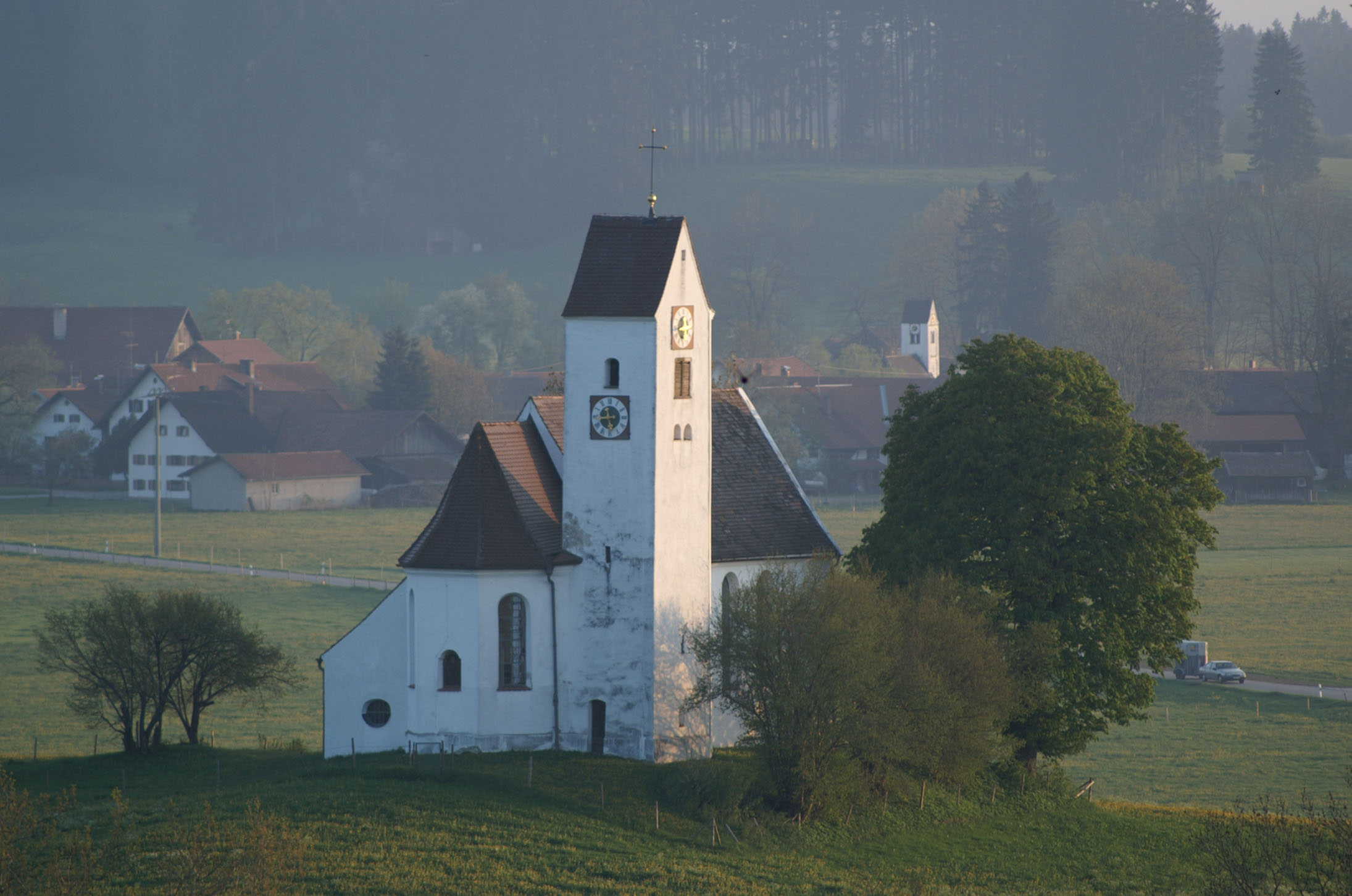 Kirche in Geislatsried, Bidingen